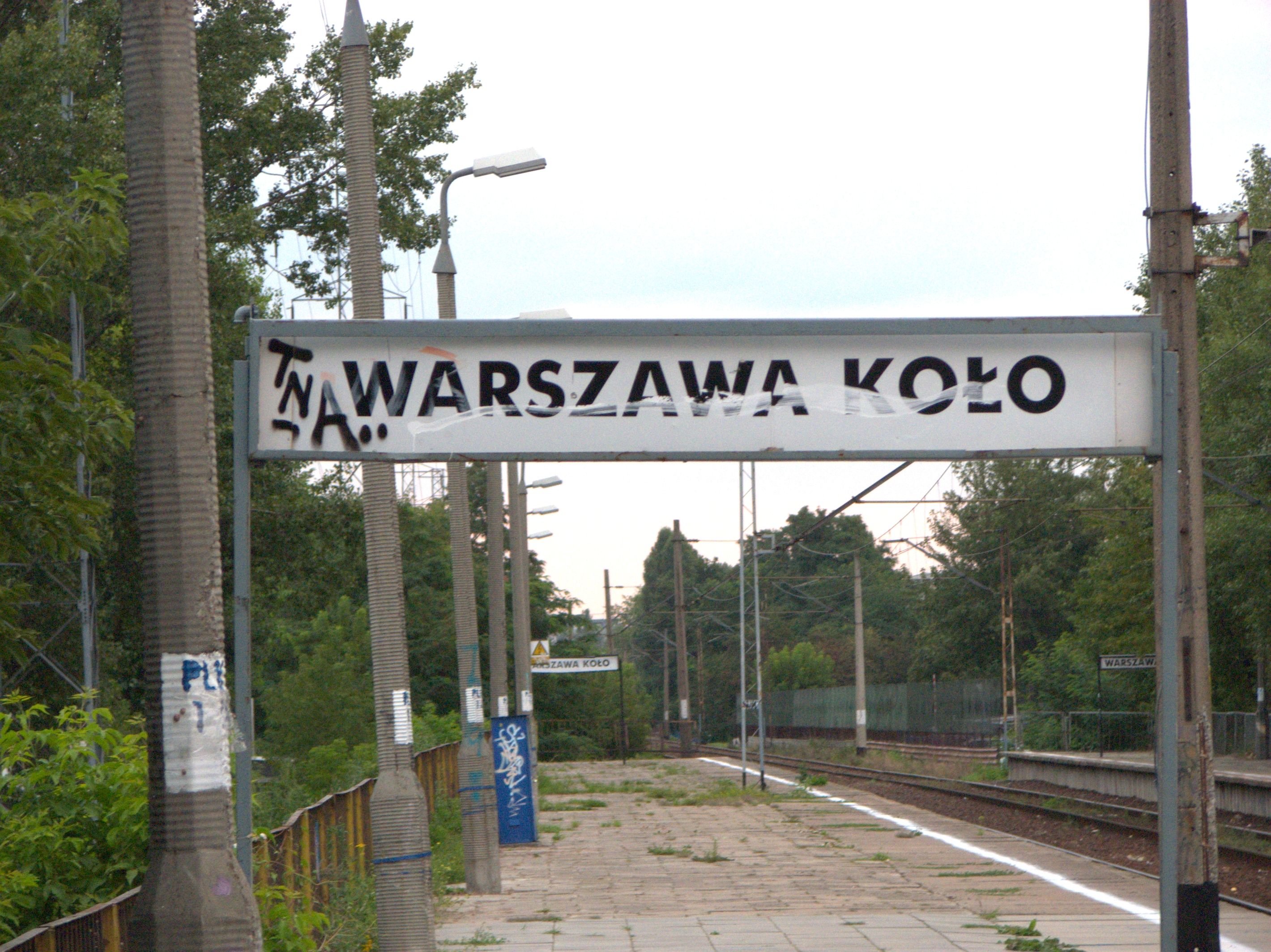 Nástupiště železniční stanice Warszawa Koło ve Varšavě.